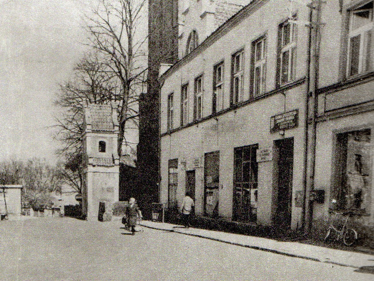 Jeziorany w 1985r.